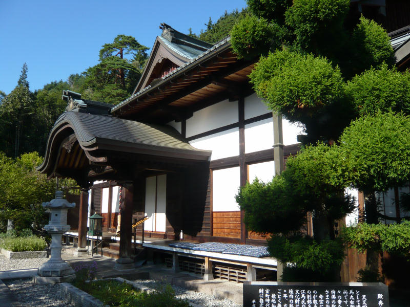 瑞岸寺本堂（神岡）